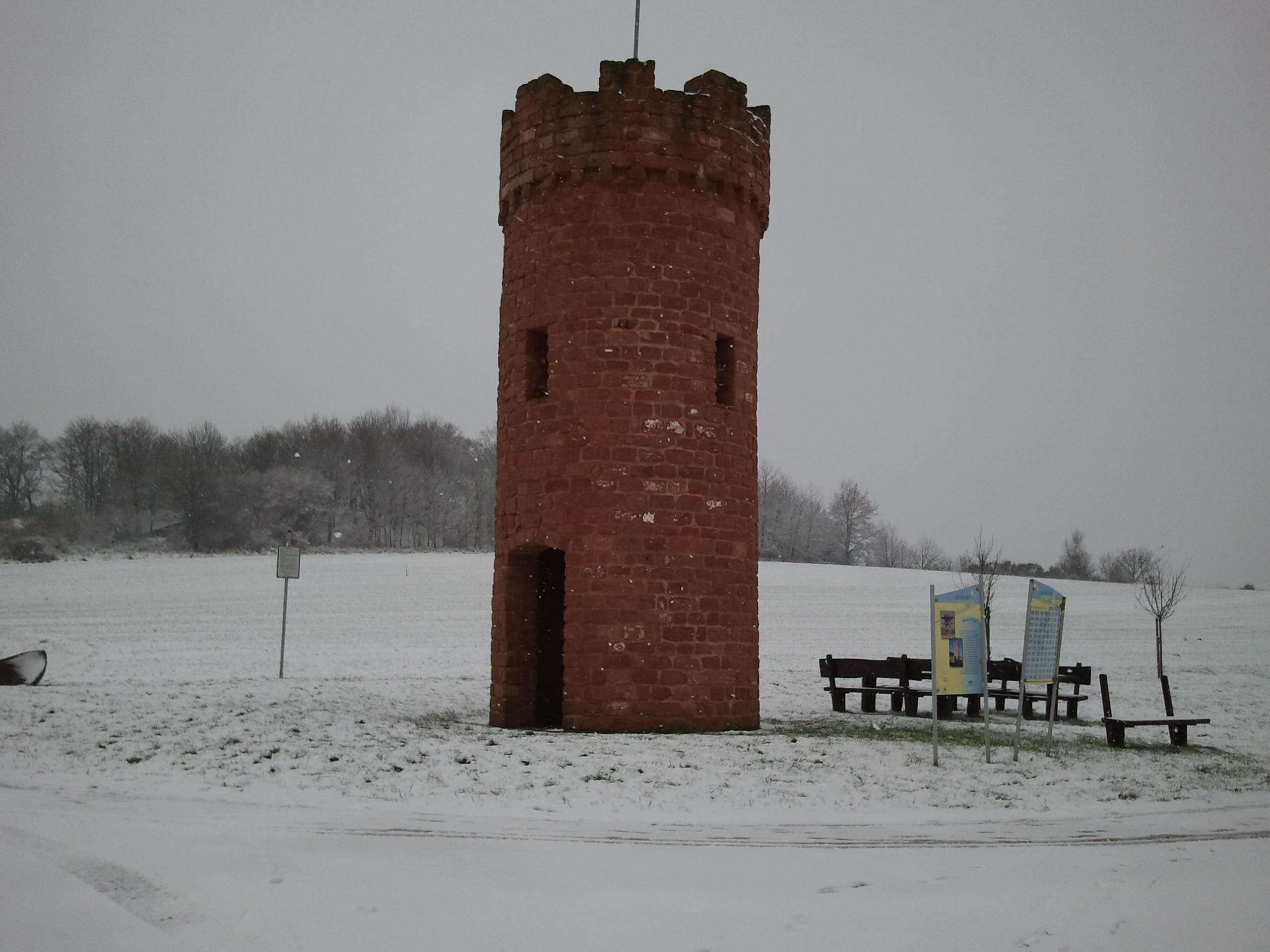 Der Ohmbacher Wartturm wurde 2005 etwas unterhalb des 375 m hohen Aussichtsberges Wartenstein errichtet.